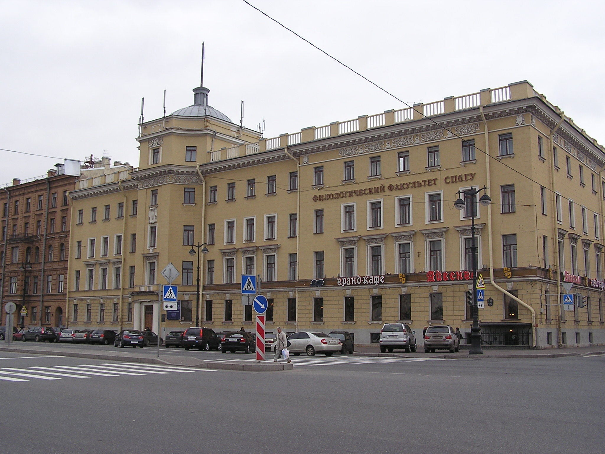 Санкт-Петербург. Одно из зданий филологического факультета СПбГУ.